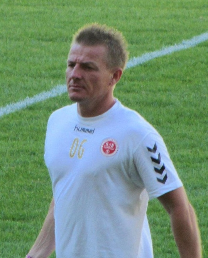 Olivier guegant